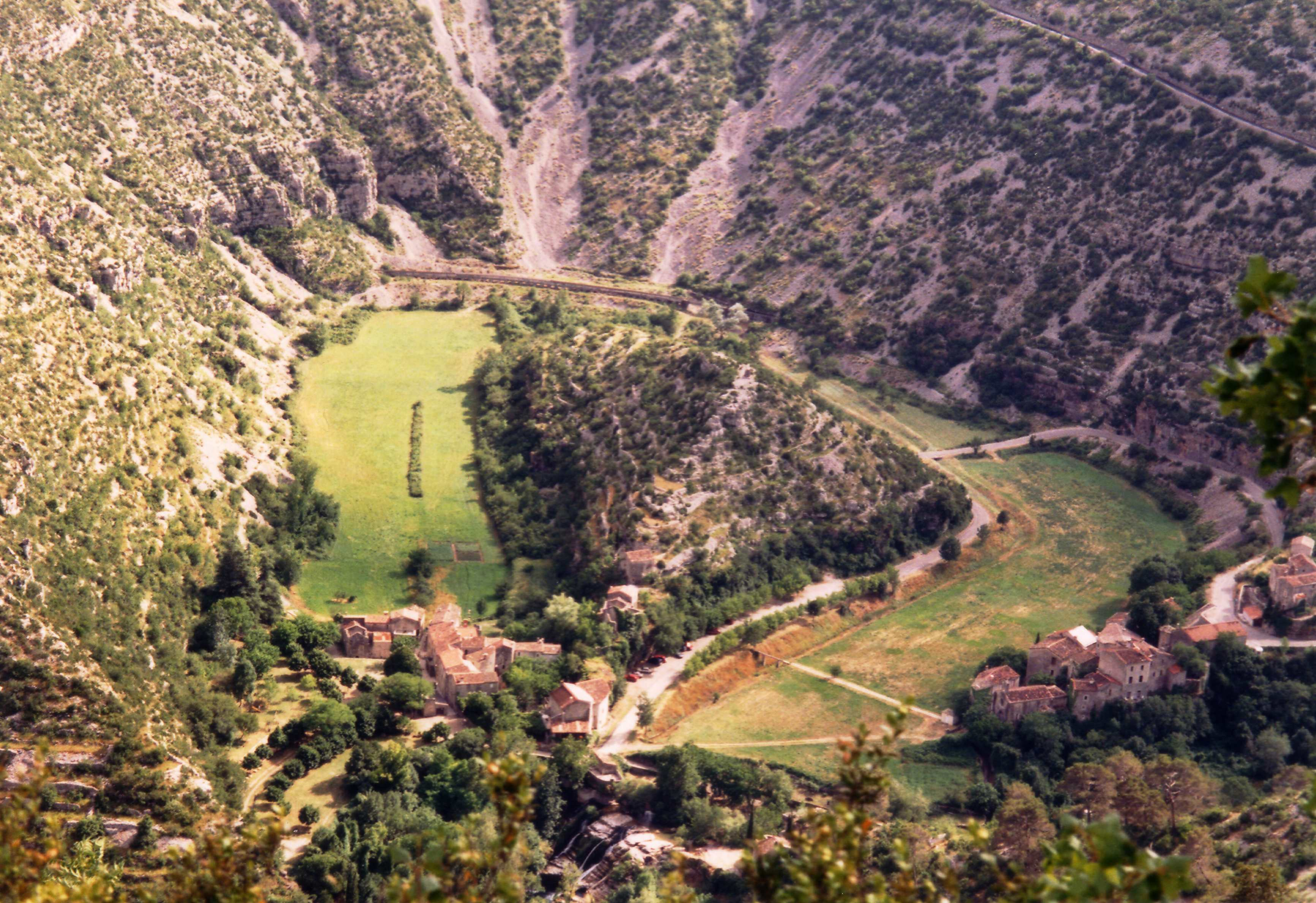 Cirque de Navacelles, département Hérault, France